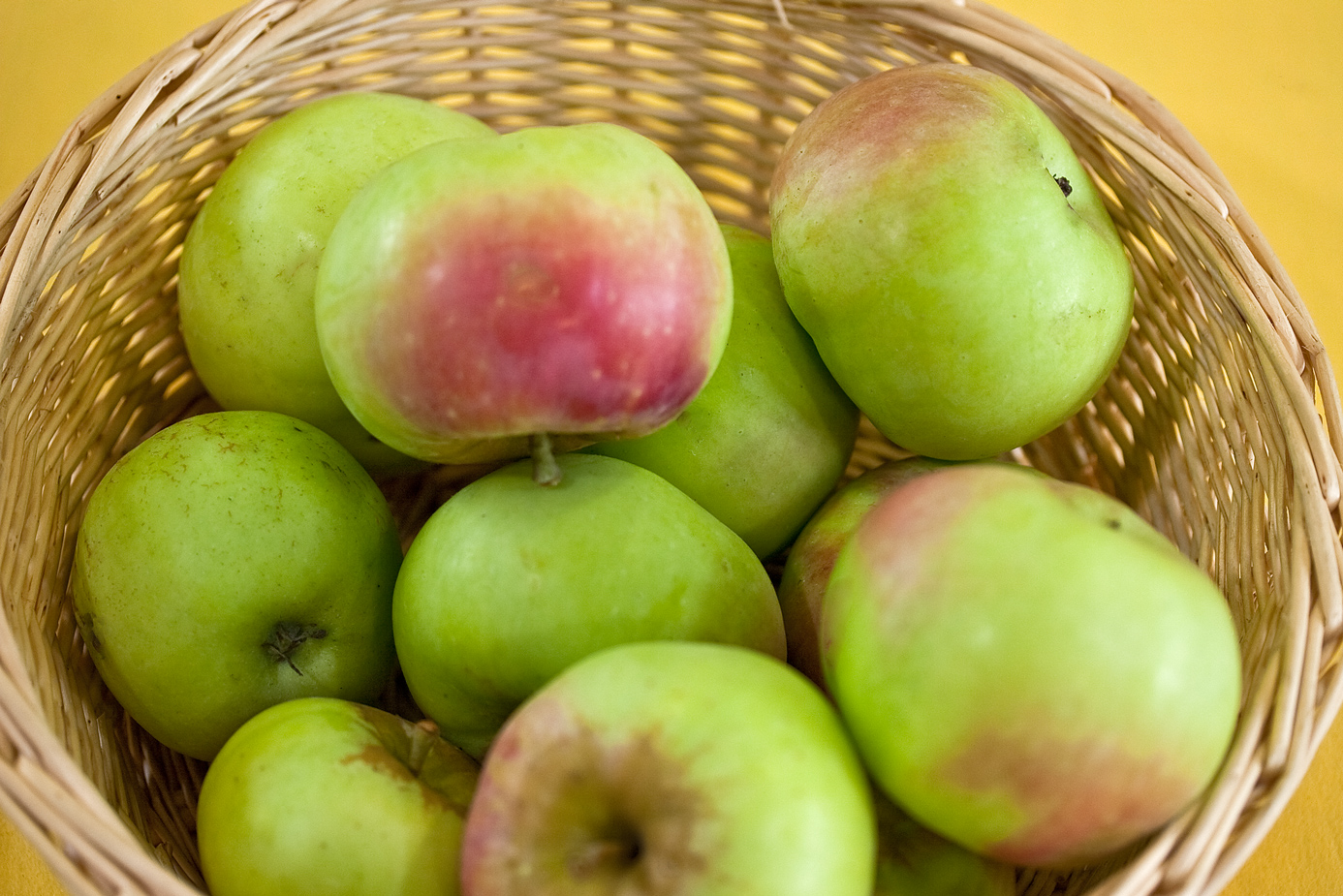 Die Champagnerrenette ist eine Apfelsorte